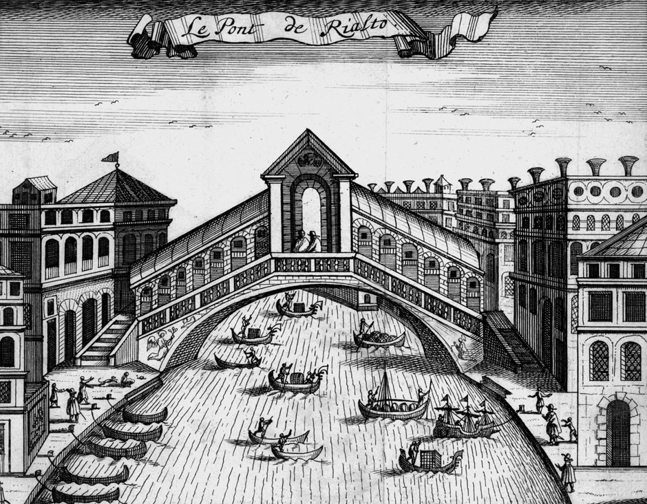 Ponte di Rialto, from: François Maximilien Misson: Nouveau voyage d'Italie, avec un mémoire contenant des avis utiles à ceux qui voudront faire le mesme voyage, 2nd edition, Den Haag, Henri van Bulderen, 1694